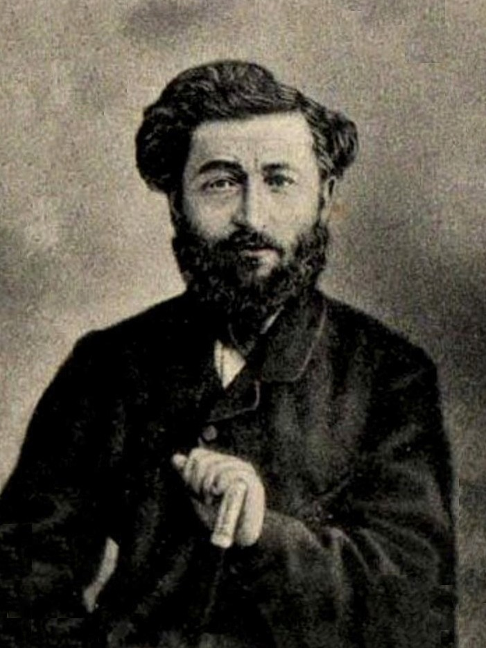 Michael Nalbandjan (1829-1866)